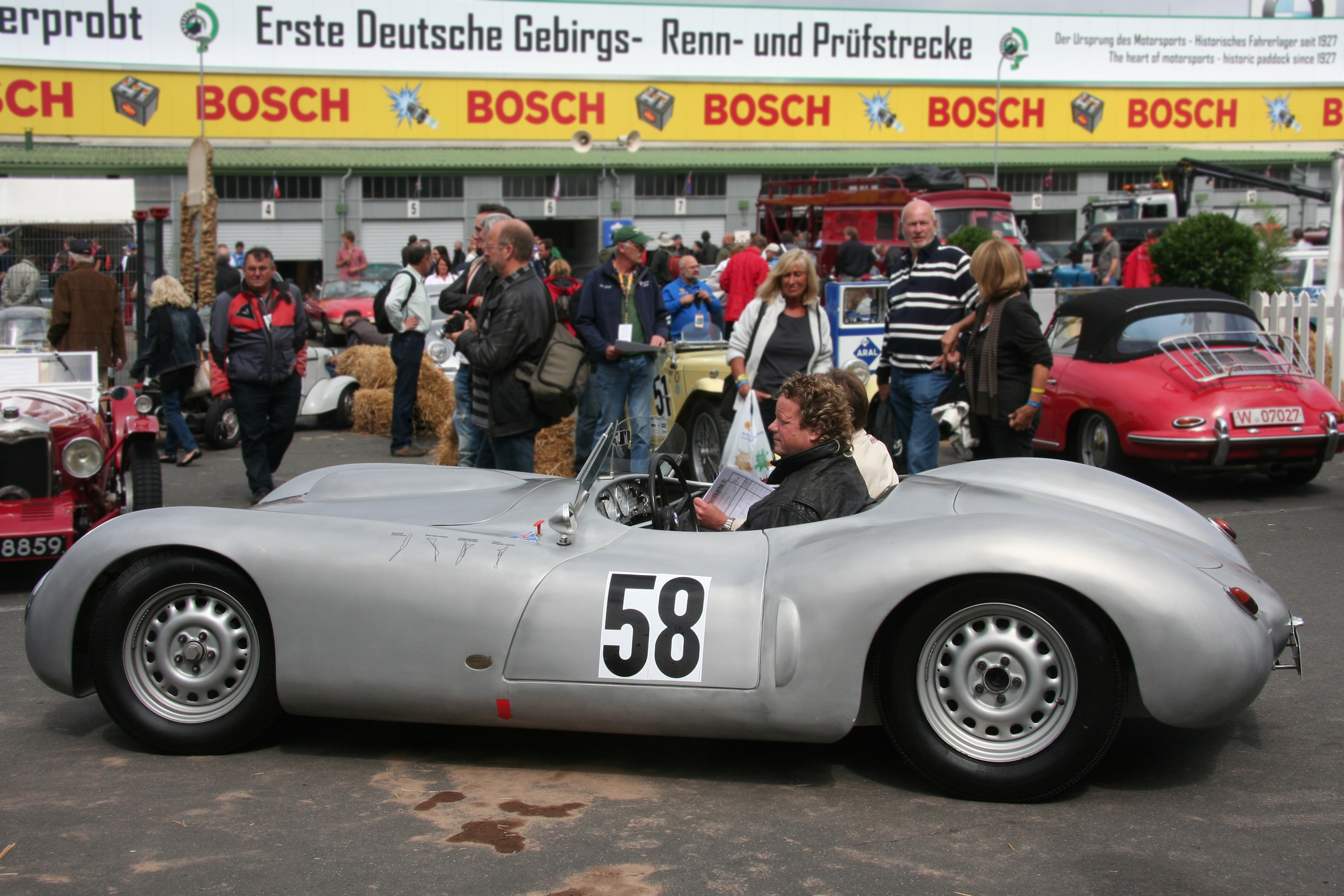 Großer Werkmeister, Rennsportwagen auf der Basis des BMW 328